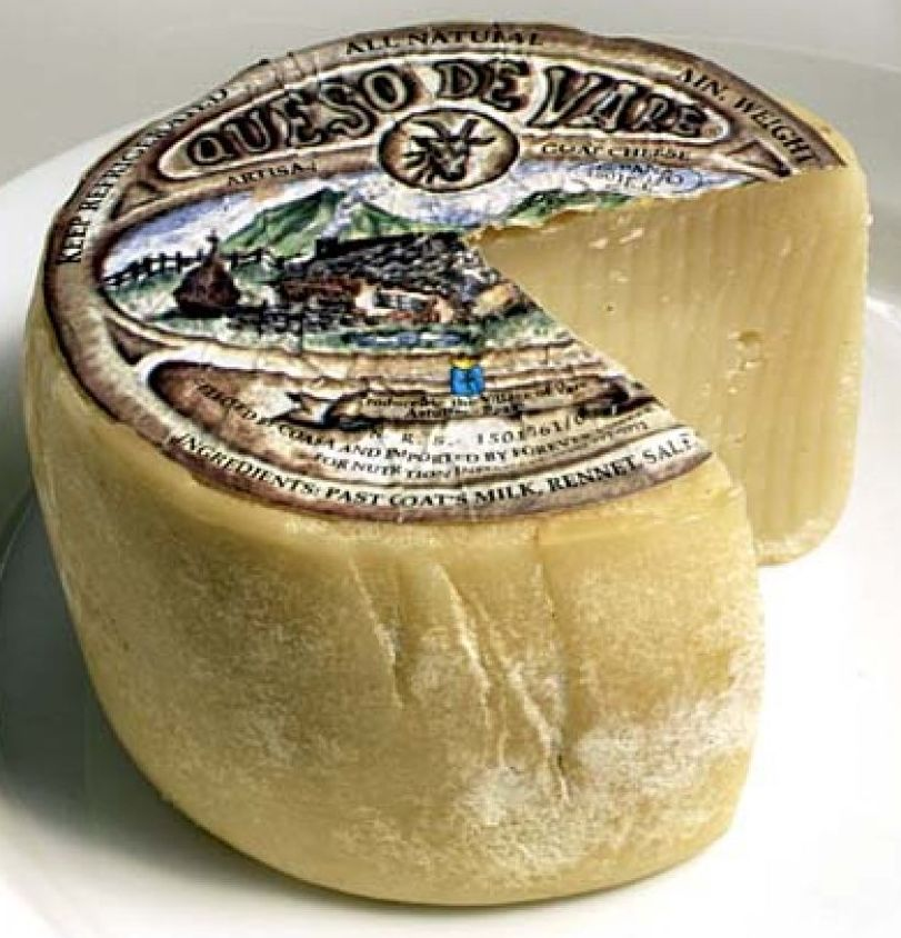 Queso Varé